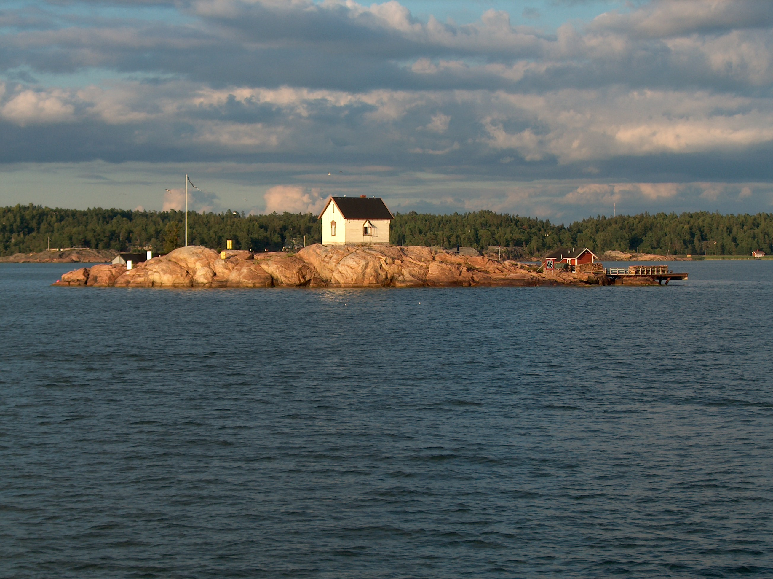 Loistokari